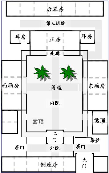 三进四合院的平面图 自己绘制